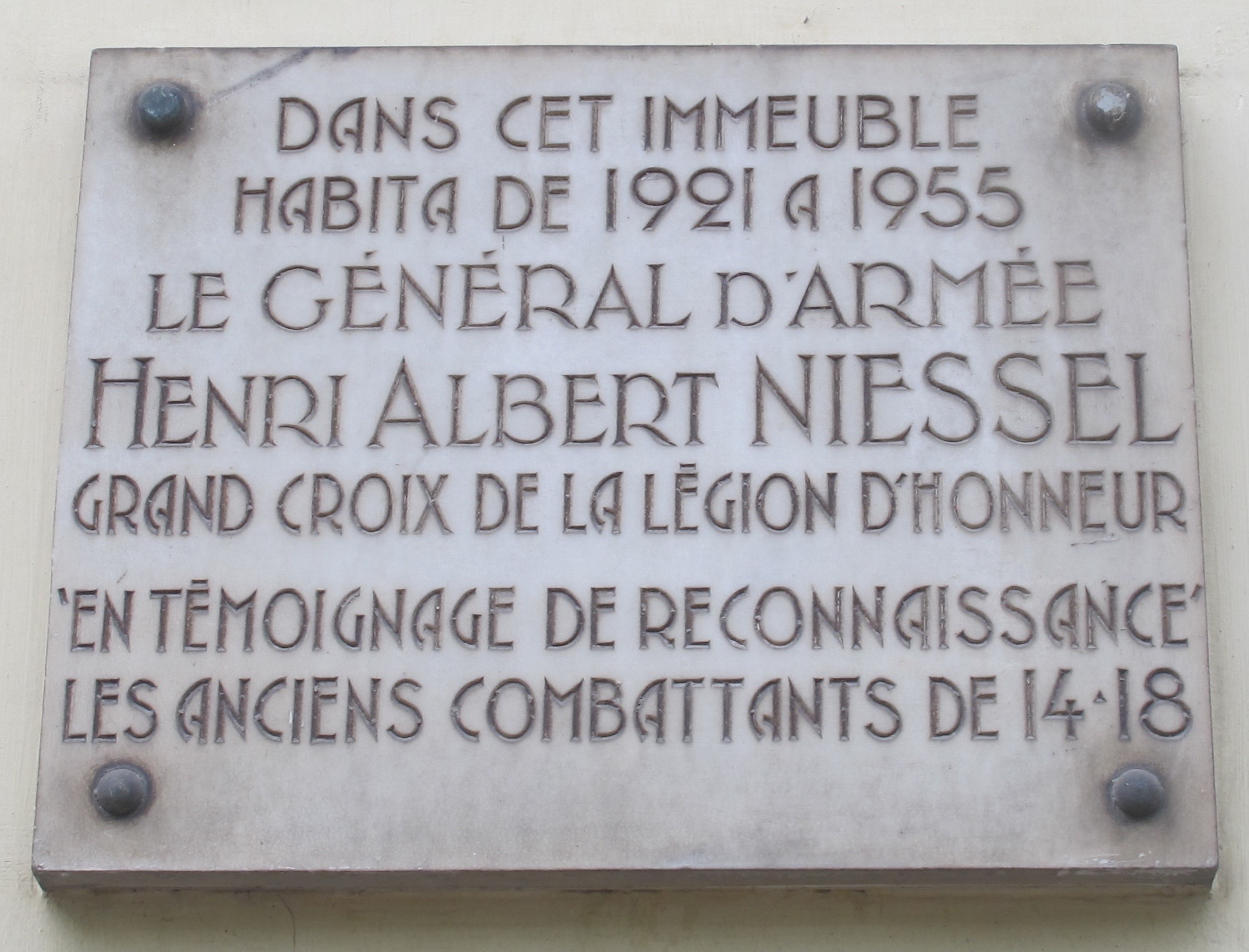 Plaque en hommage au général Henri Albert Niessel, qui habita dans cet immeuble entre 1921 et 1955, 34 boulevard des Invalides (Paris, 7e).